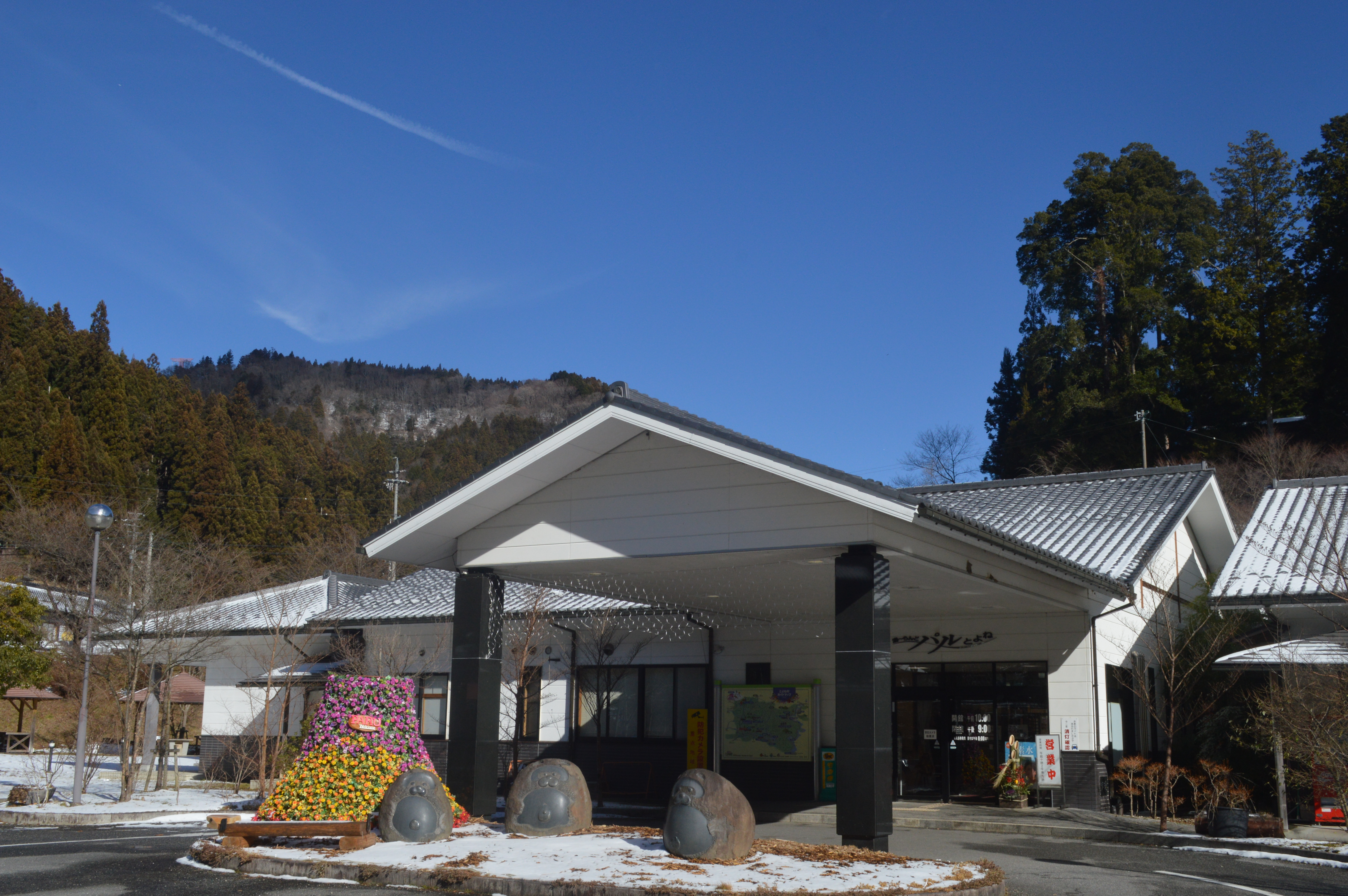 愛知県北設楽郡豊根村の湯～らんど パルとよね。